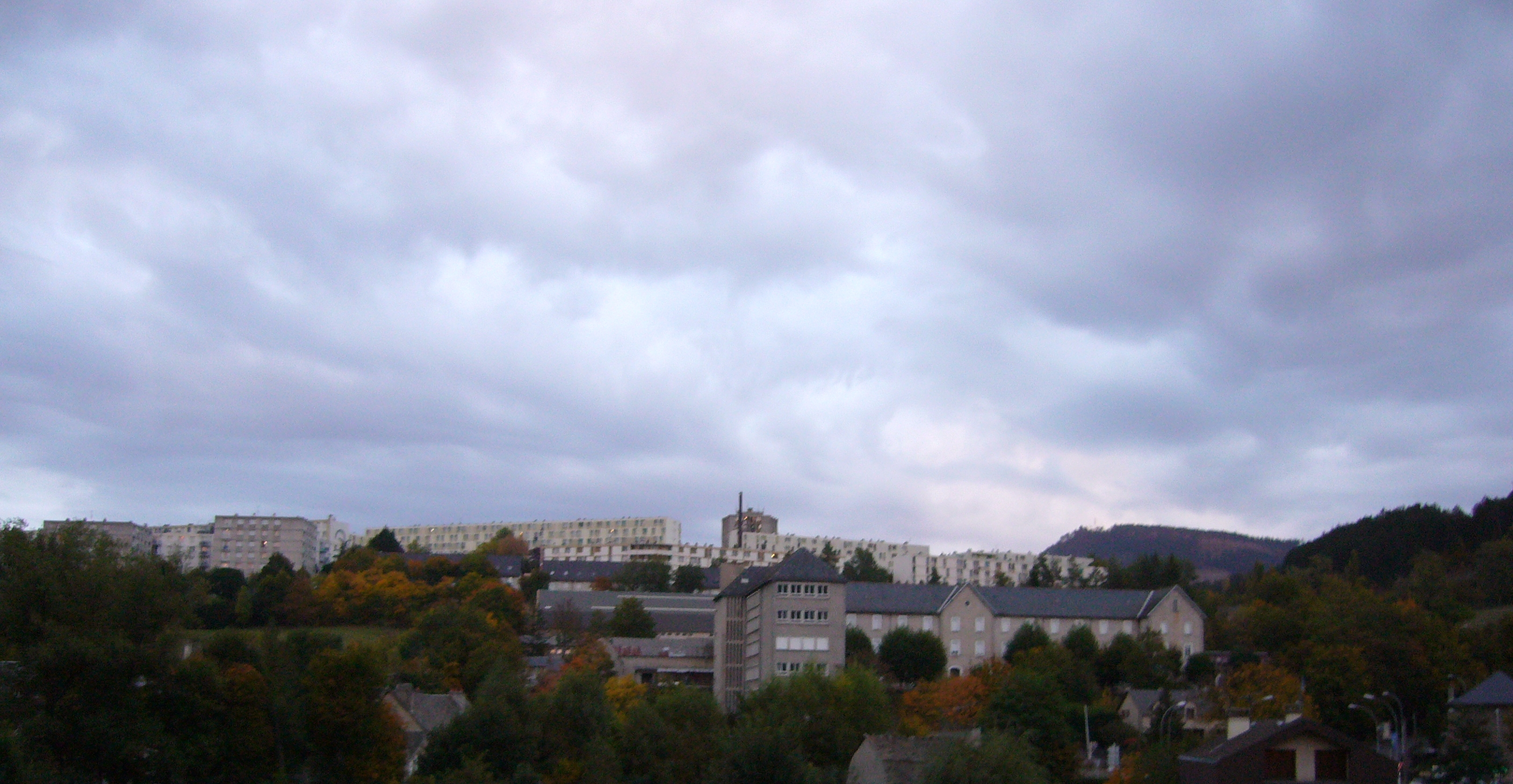 Quartier de Fontanilles (Mende, Lozère, France)